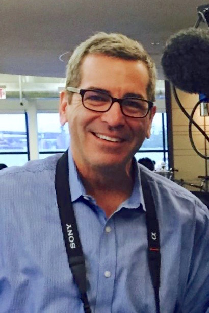 Journalist Miles O'Brien in 2014